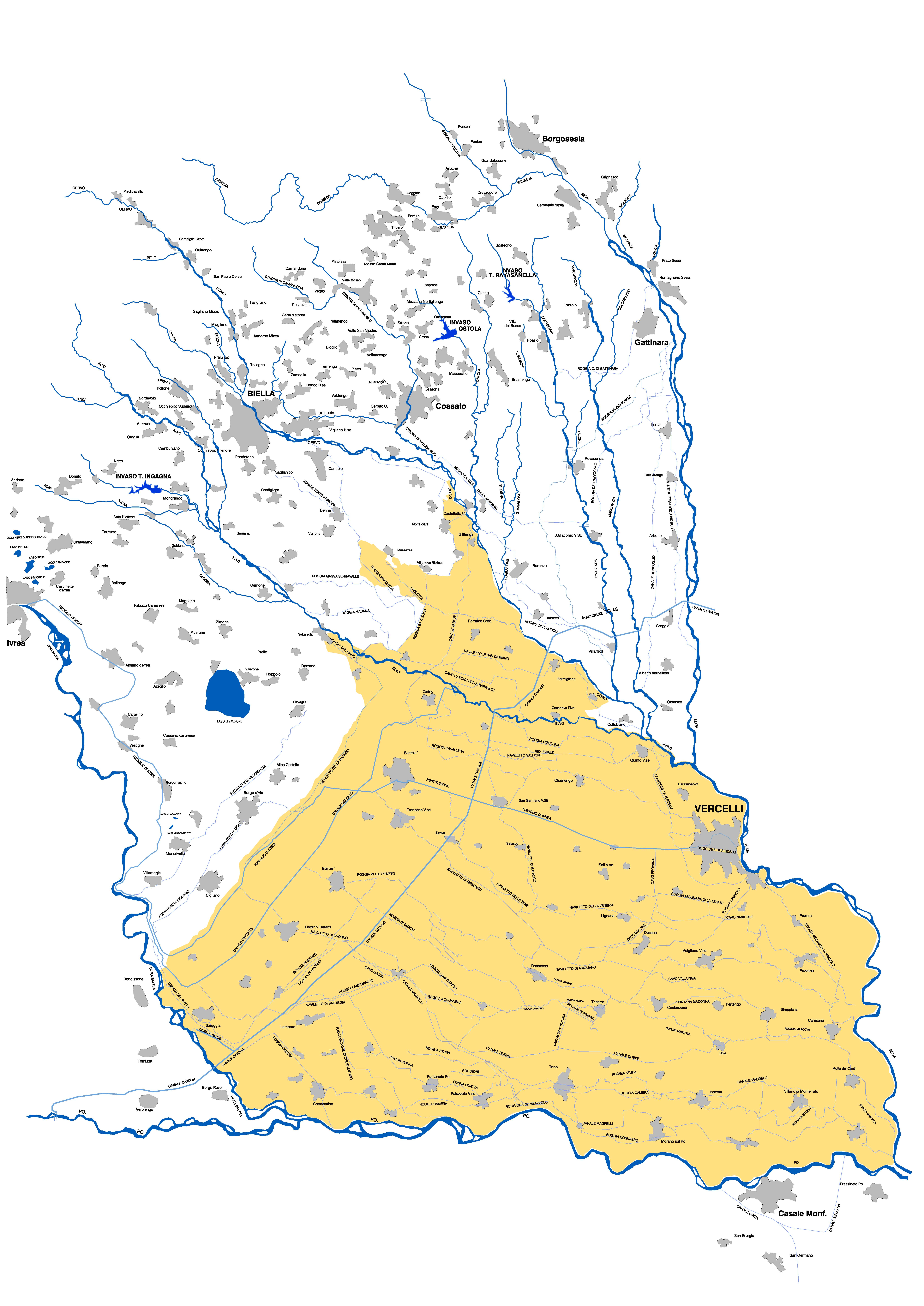 Comprensorio AIOS